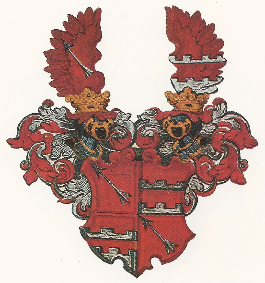 Wappen der Familie Schneeweiß